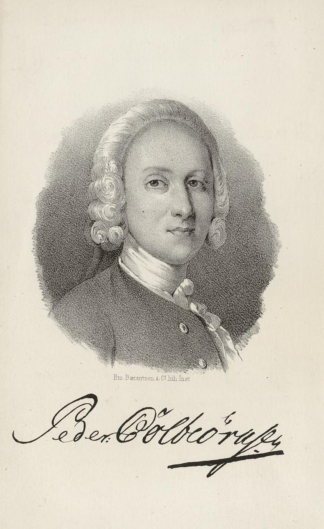 Illustrasjon hentet fra boken "Kort underretning om Frederikshalds by og dens krigshistorie" av Krag, H.P.S. og utgitt av Paa Forfatterens Forlag (Christiania, 1848) Depicted person: Peder Colbjørnsen (1683-1738)